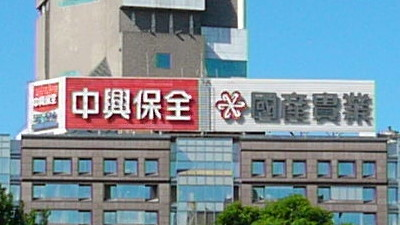 國產實業大樓頂樓的中興保全與國產實業廣告霓虹燈。